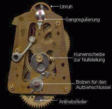 Photo eines mechanischen Uhrwerks GFDL